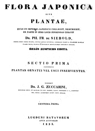 Page titre Zuccarini.